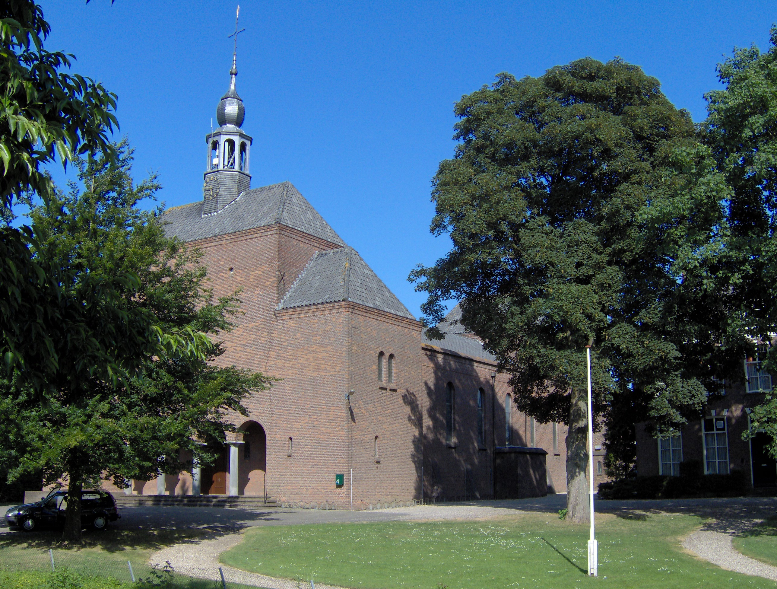 Zicht op een deel van de Sint-Willibrorduskerk in Hedel, eigen foto